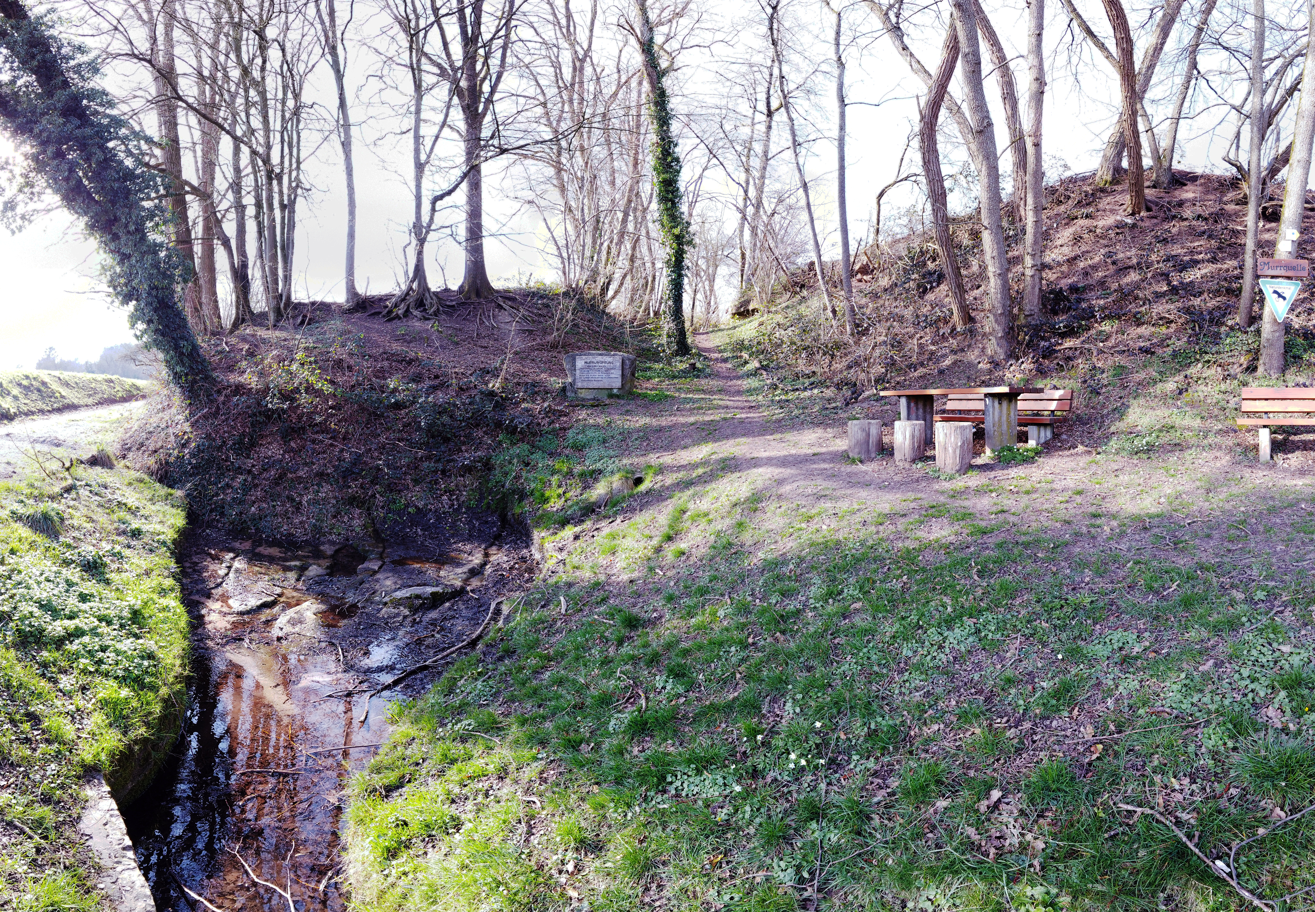 Der Quelltopf mit Ursprung der Murr